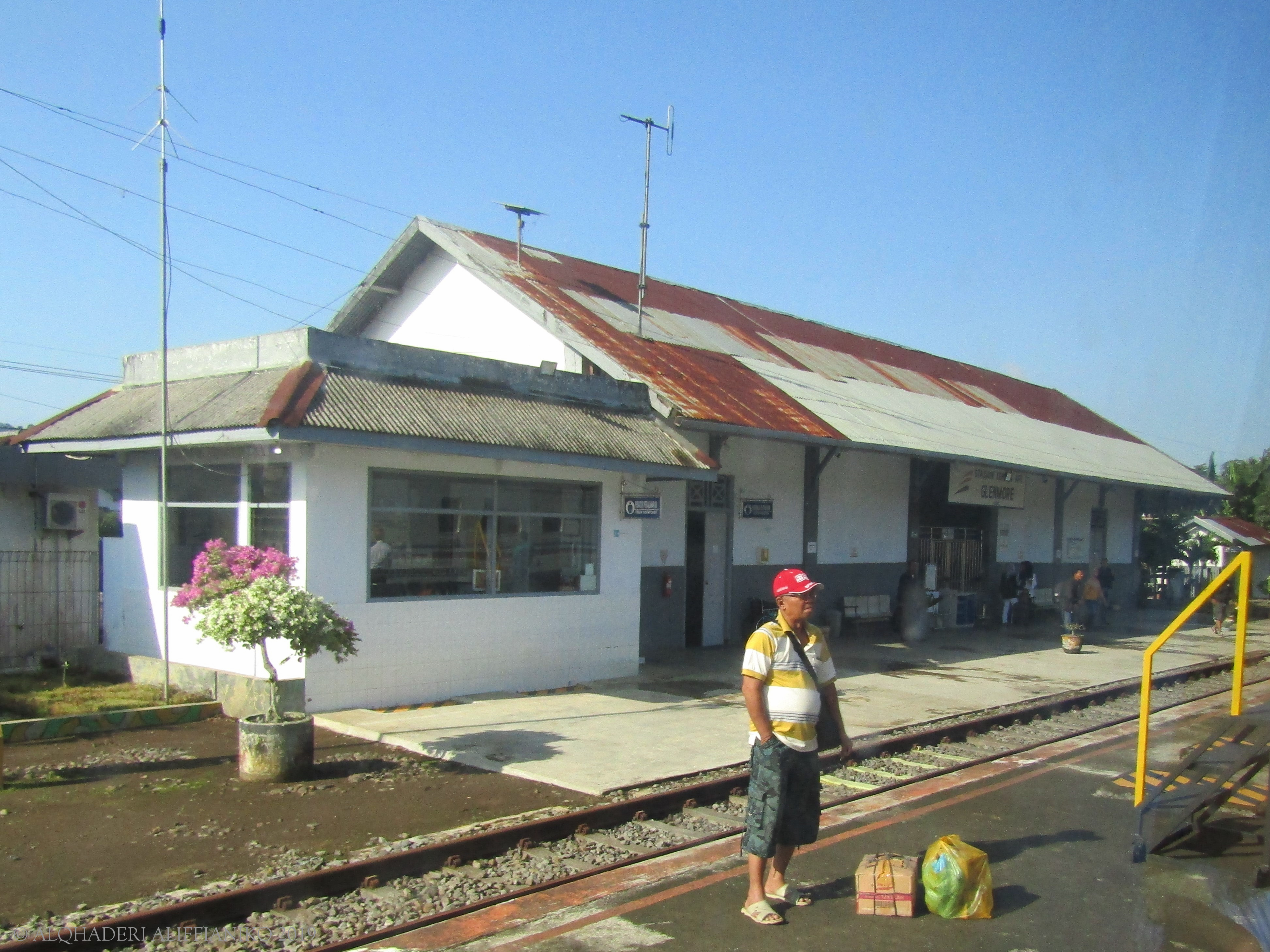 Stasiun Glenmore, dilihat dari peron